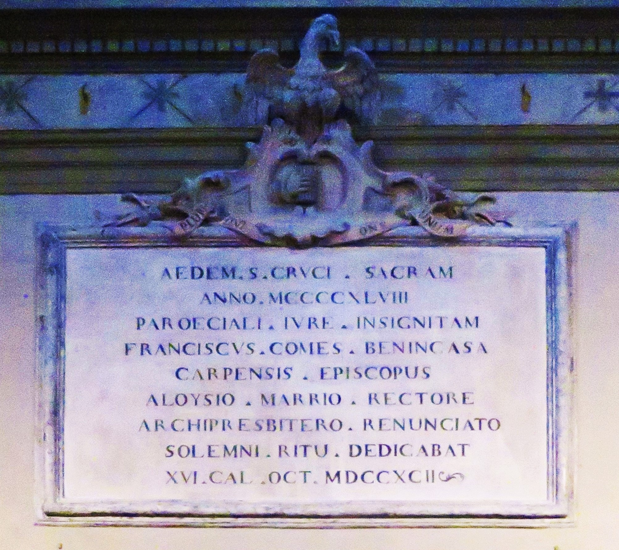 Chiesa dell'Invenzione della Santa Croce Carpi. Navata centrale. Targa sopra l'ingresso principale che ricorda la consacrazione che avvenne il nell'ottobre del 1792 e venne celebrata dal vescovo di Carpi Francesco Benincasa.